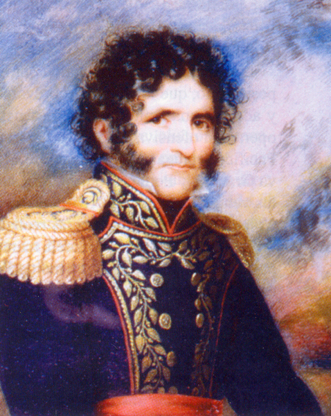 Juan Facundo Quiroga. Miniatura de autor anónimo que perteneció a Rosas ; After a painting by Fernando García del Molino.